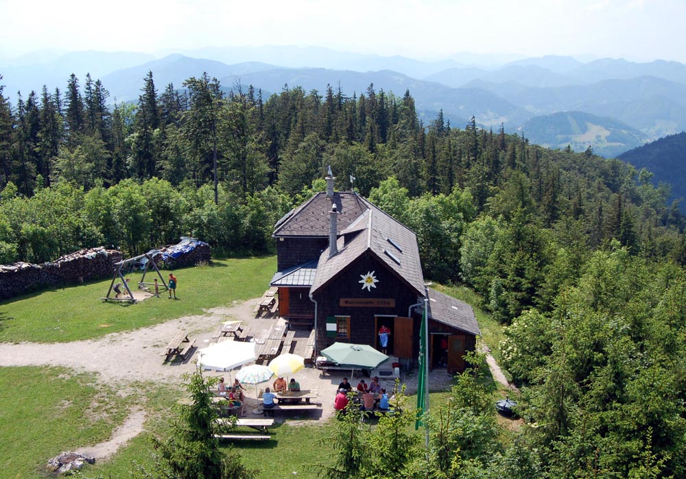 Prochenberghütte auf dem Prochenberg (1123 m) in Niederösterreich, nahe Ybbsitz.